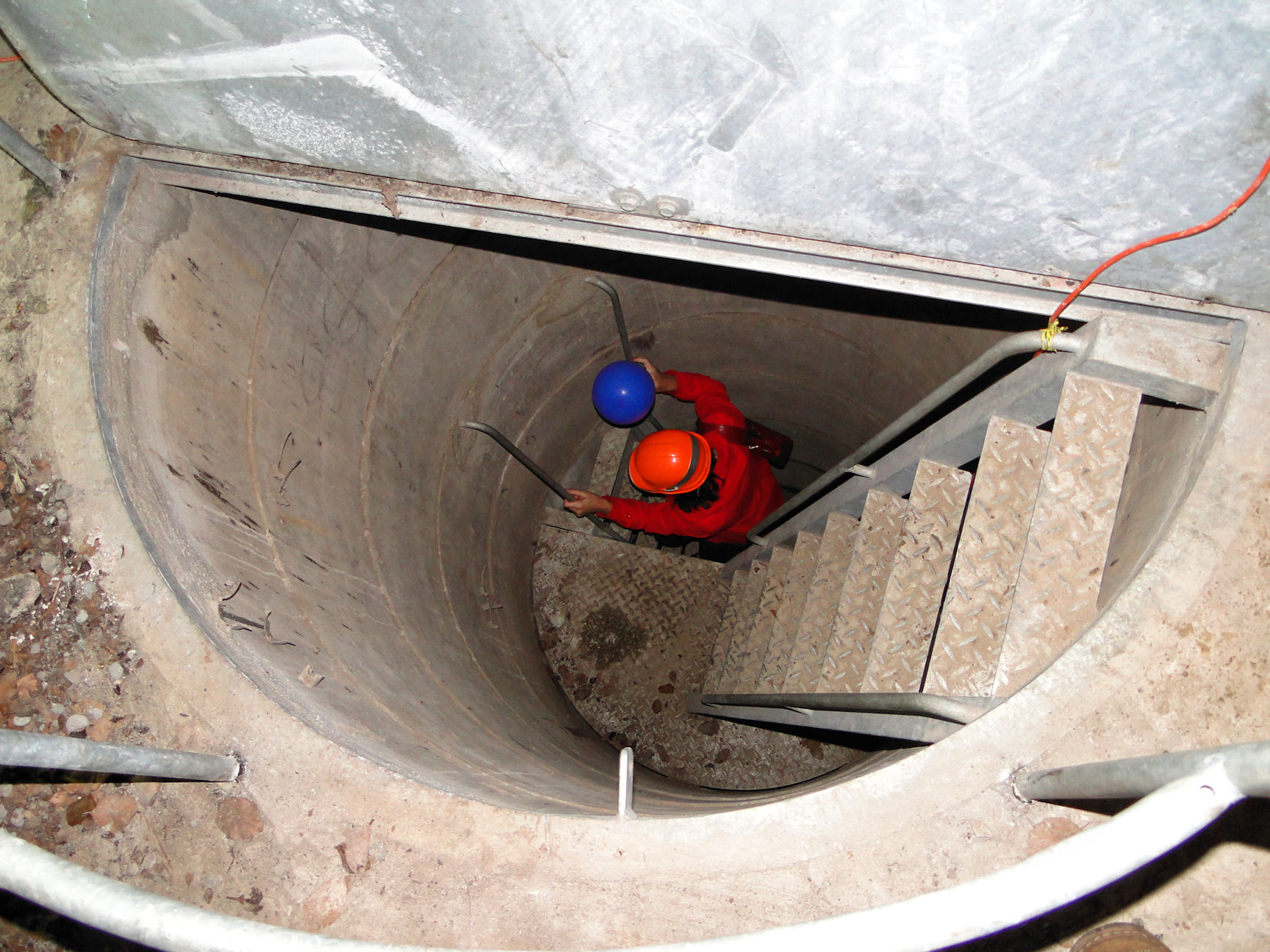 Podziemia nad Jeziorem Szmaragdowym